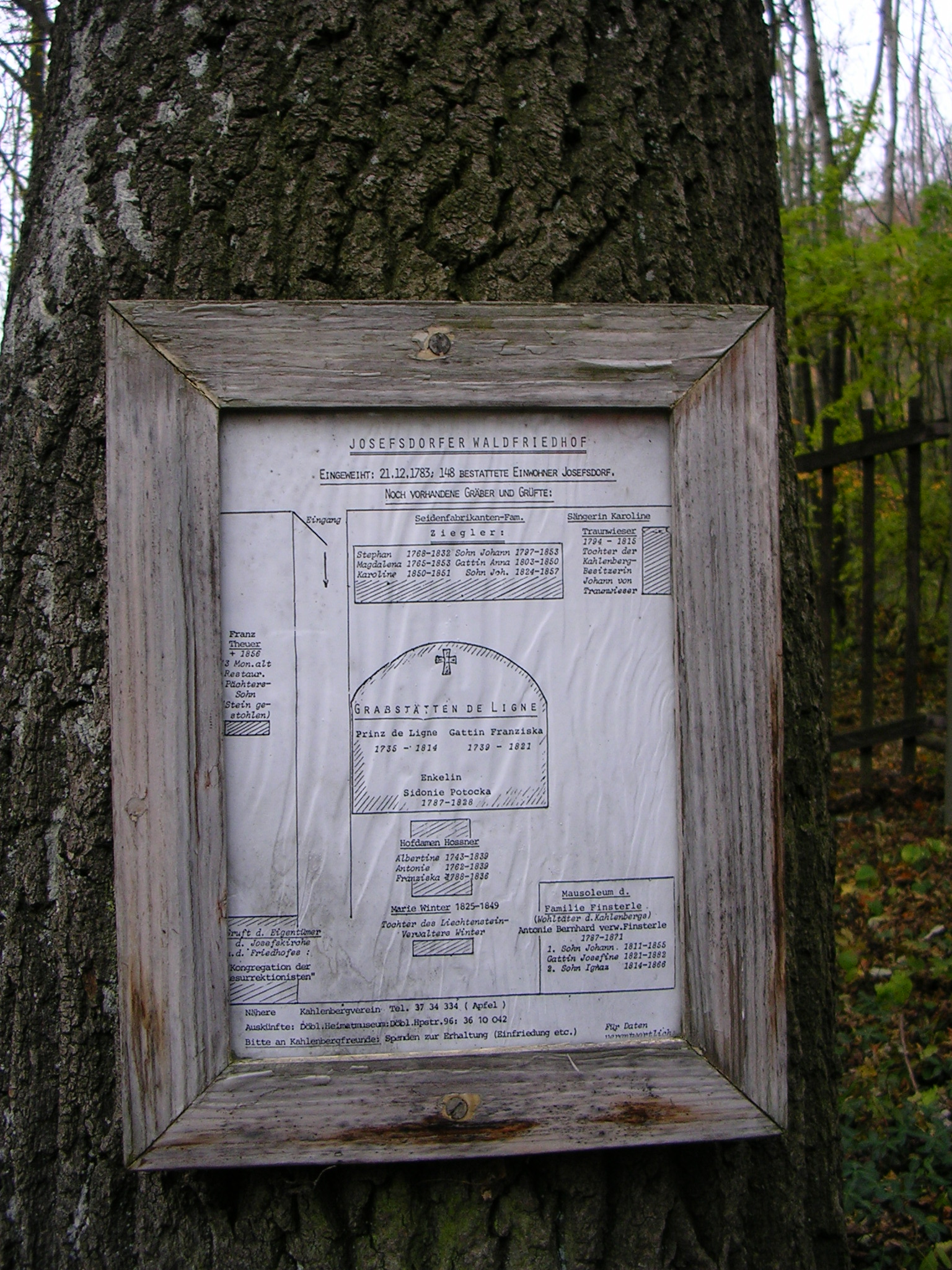 Waldfriedhof Kahlenberg Lageplan